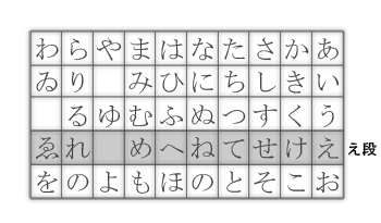 え段在日語五十音圖中的位置。